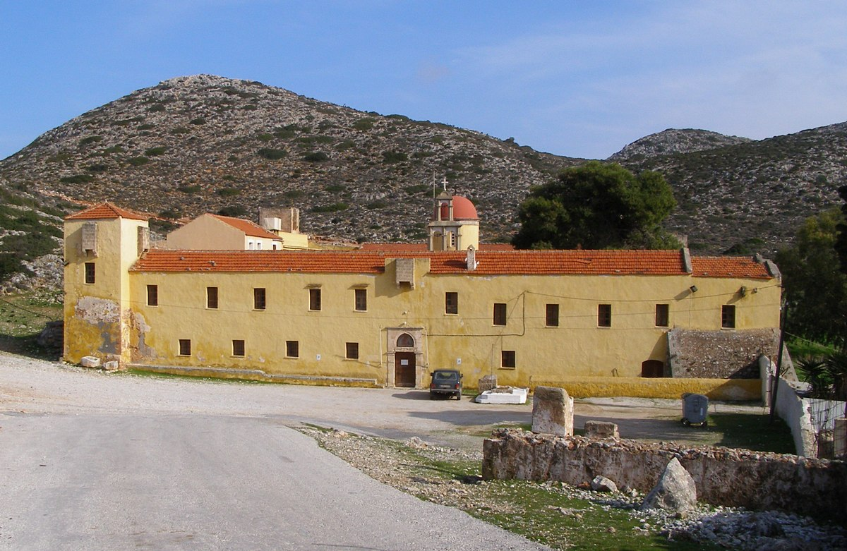 Kloster Gouverneto auf der Halbinsel Akrotiri